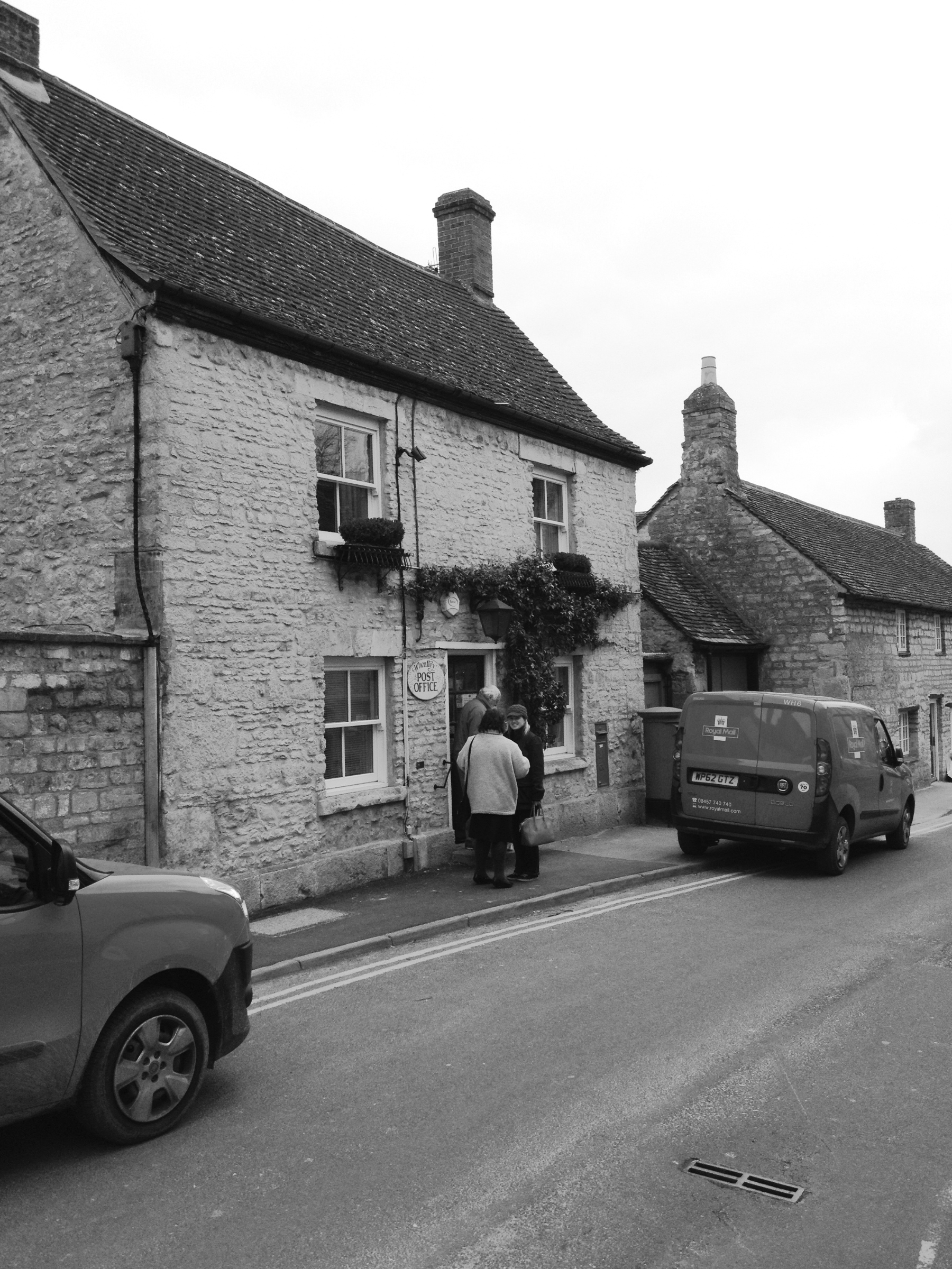 Post Office Wheatley